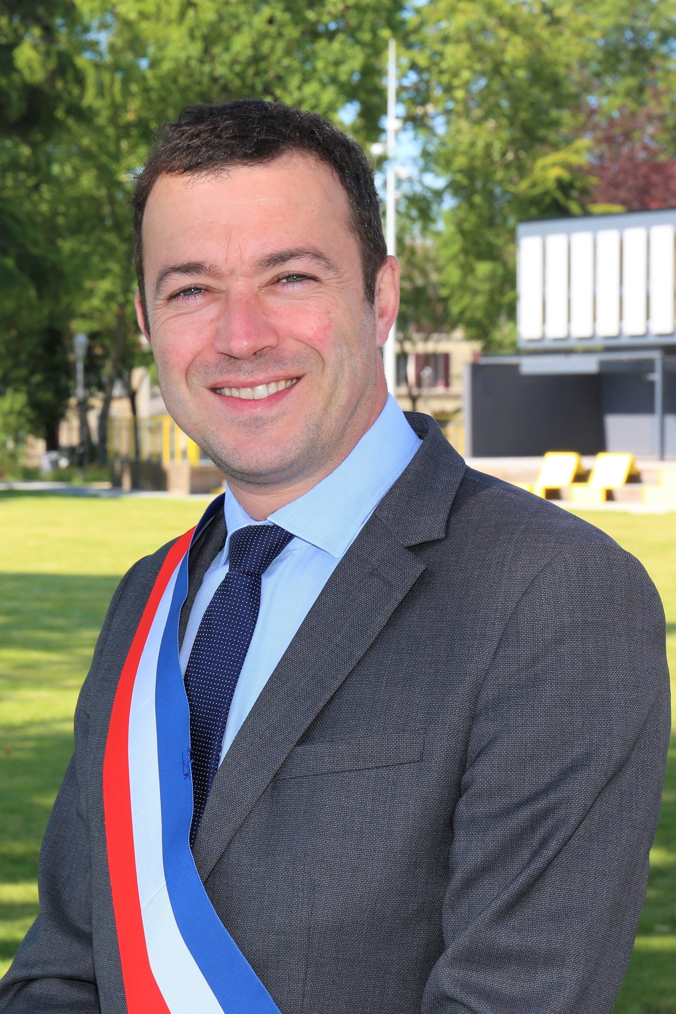 Raphaël Cognet portrait 2020